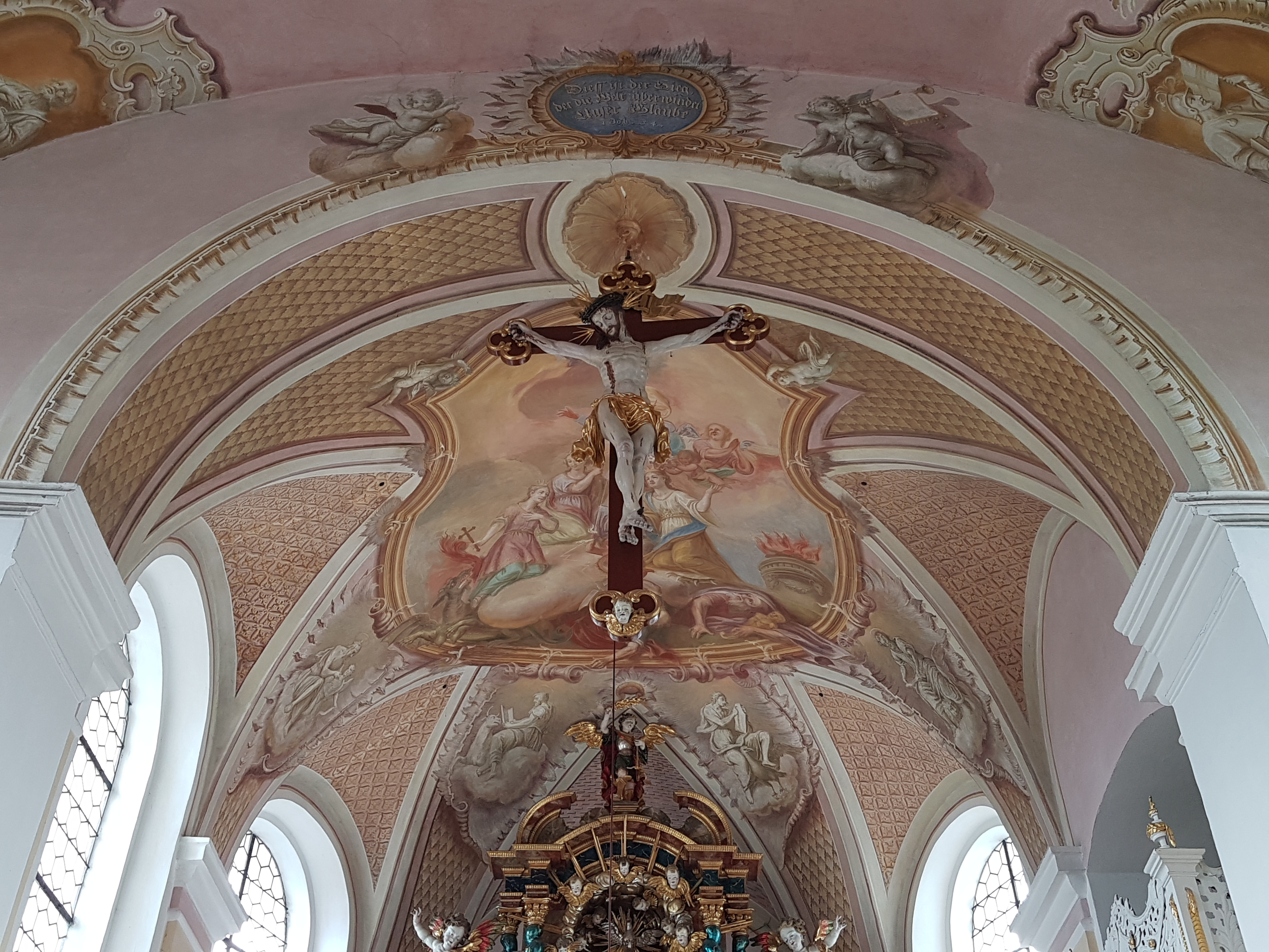 Issing (Vilgertshofen), Pfarrkirche St. Margaretha, Chorgewölbe mit dem Fresko Die Hl. Margaretha, Barbara und Katharina (1777, J.B. Baader). Chorbogen-Kreuz von Johann Luidl, 1720/30.